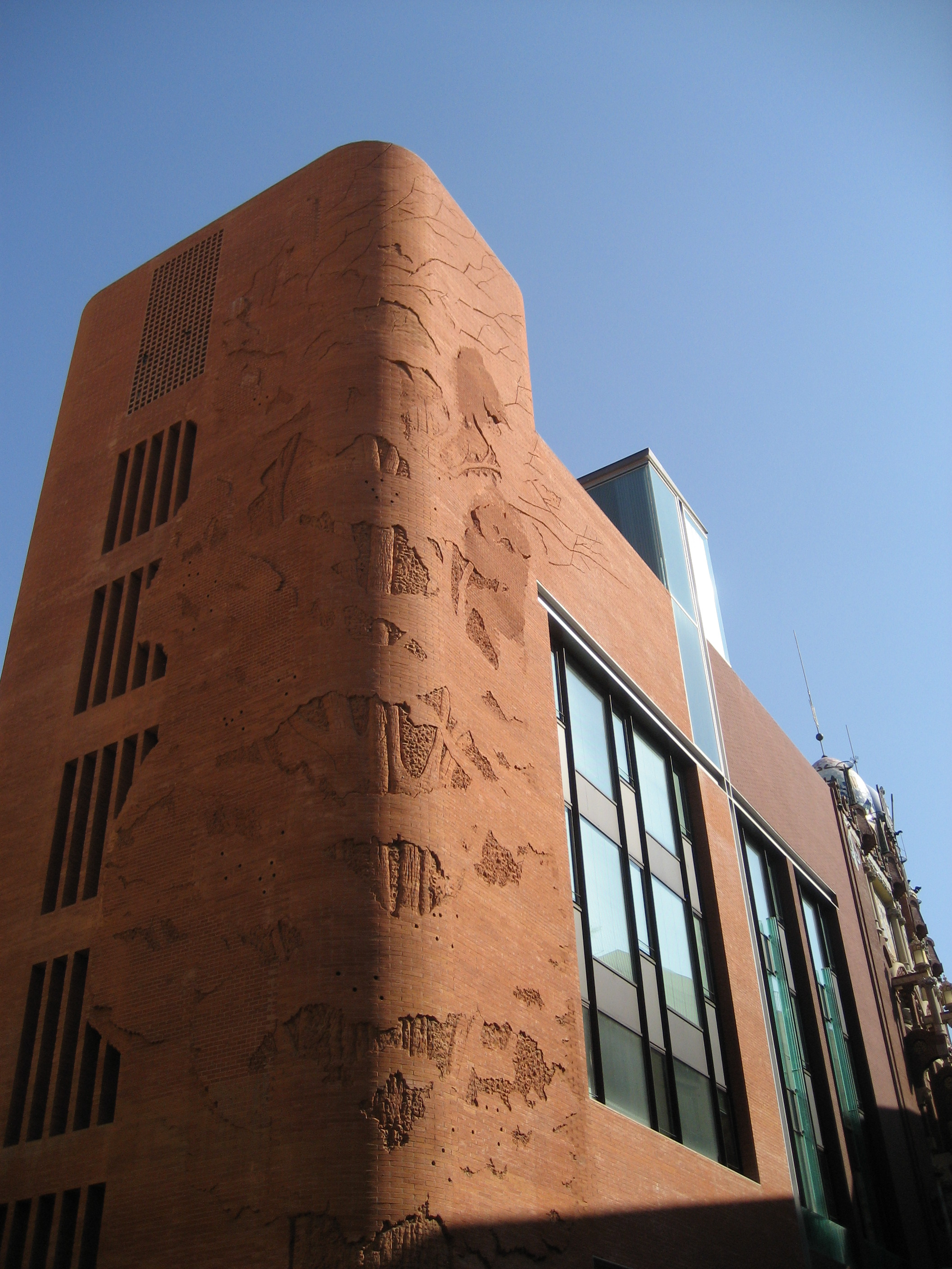 Edificio del Palau de la Música Catalana, esquina calle Sant Pere més Alt en Barcelona.